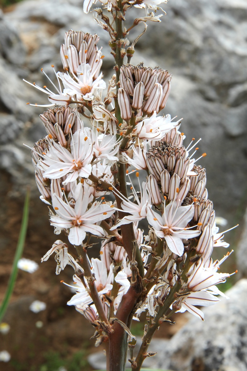 Asphodelus ramosus (Blütenstand)(det. user:RLJ, see Díaz Lifante, Z. & Valdés, B. 1996: Revisión del género Asphodelus L. (Asphodelaceae) en el Mediterráneo Occidental. - Boissiera 52: 189 pp.)